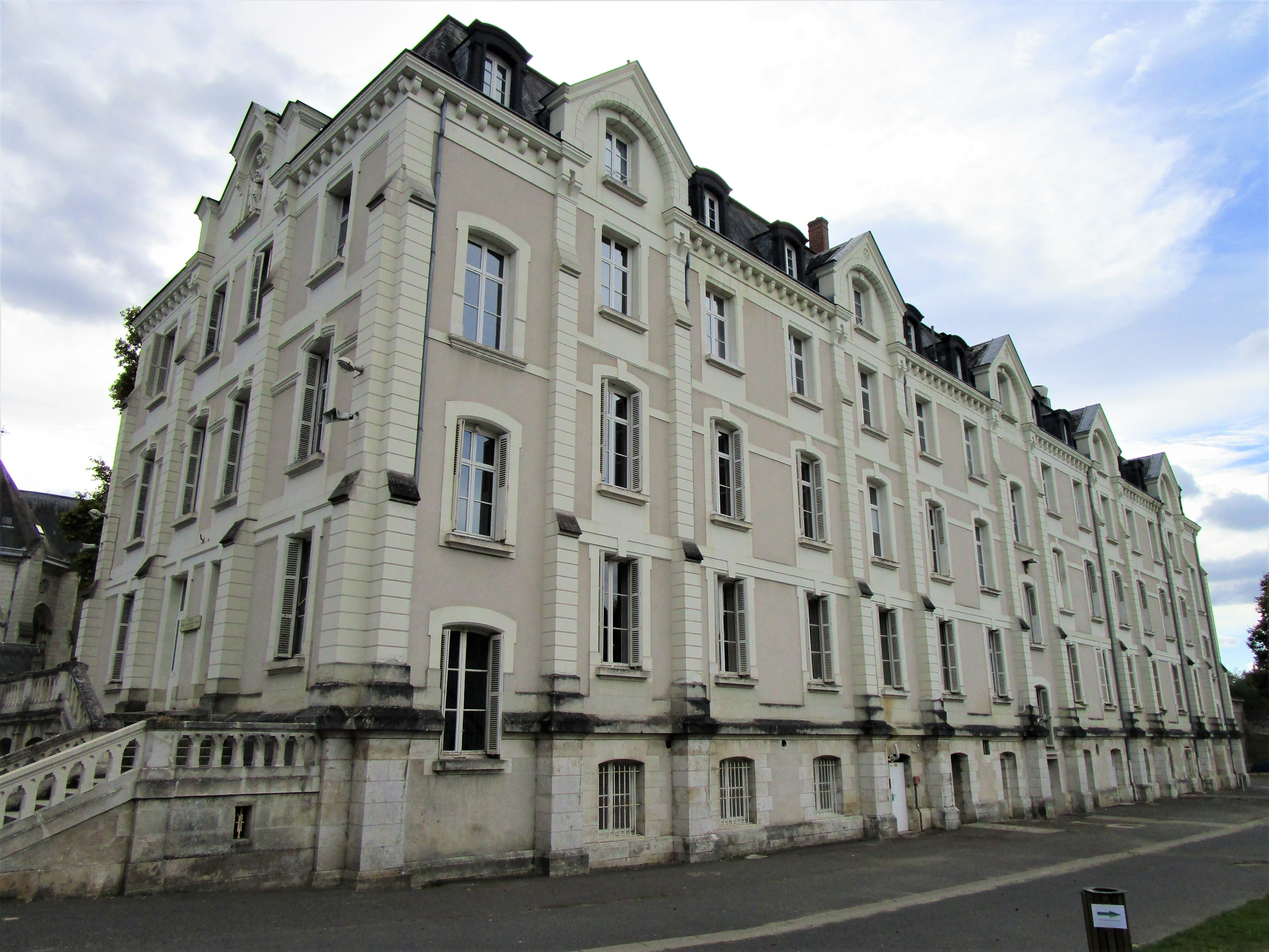 Bâtiments de l'Institution Marmoutier, dans le quartier Sainte-Radegonde